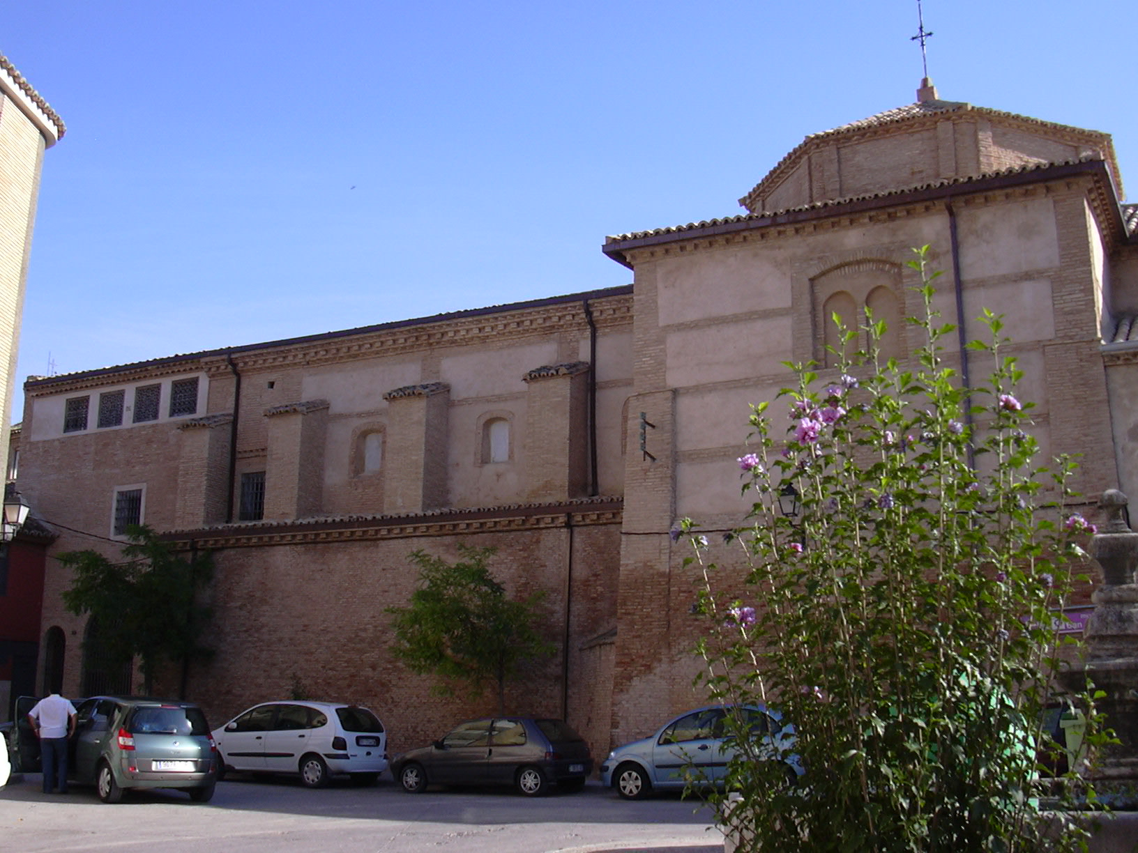 Borja - Convento de Santa Clara s. XVII - Lateral